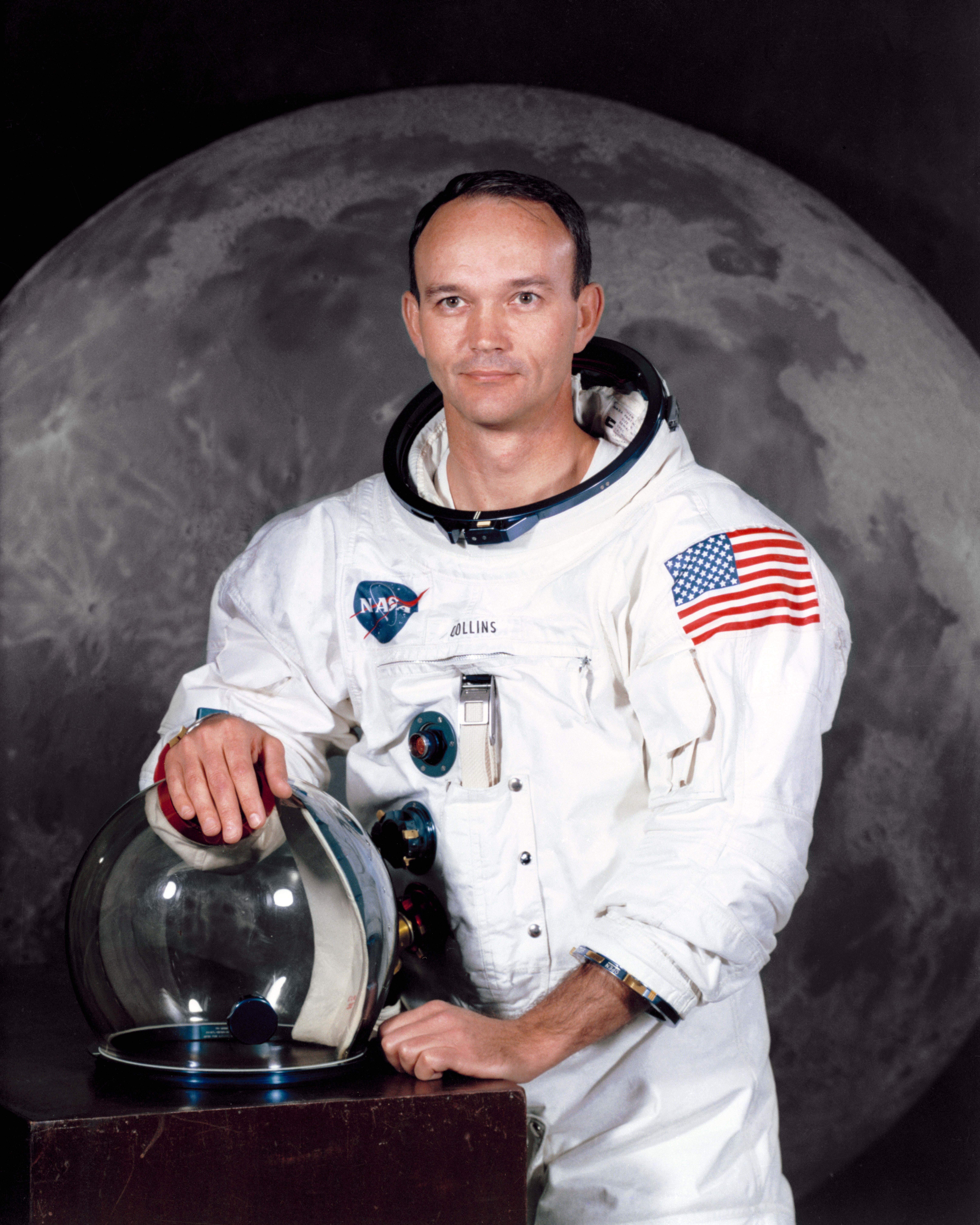 Michael Collins' portrait in a spacesuit.